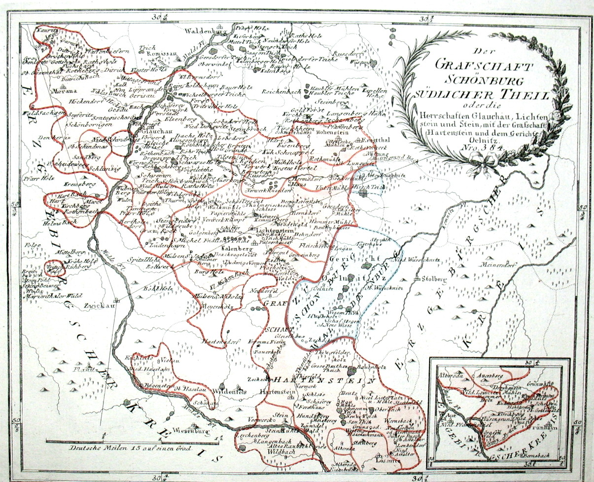 Der Grafschaft Schönburg Südlicher Theil oder die Herrschaften Glauchau, Lichtenstein und Stein, mit der Grafschaft Hartenstein und dem Gerichte Oelnitz. Nro. 384. Kolorierter Kupferstich